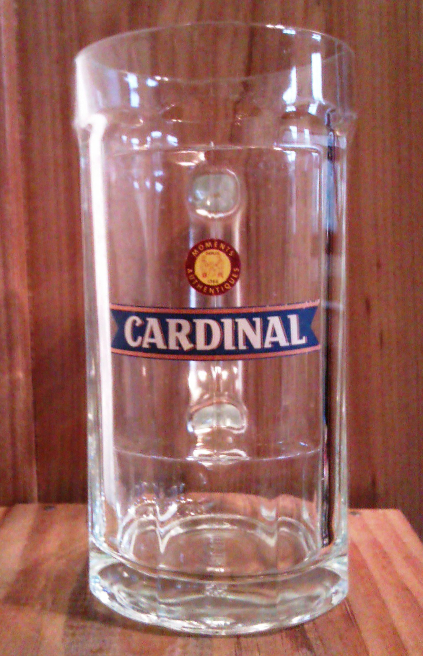 Chope de bière Cardinal de contenance 50 cl.